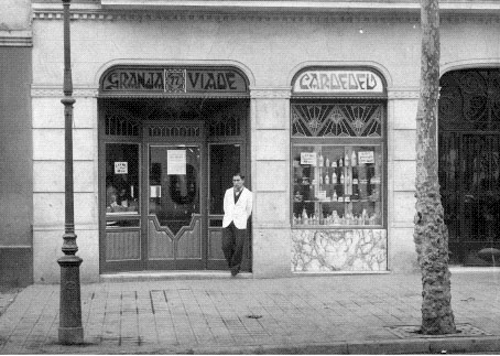 Foto de Joan Viader davant de la granja del carrer Urgell